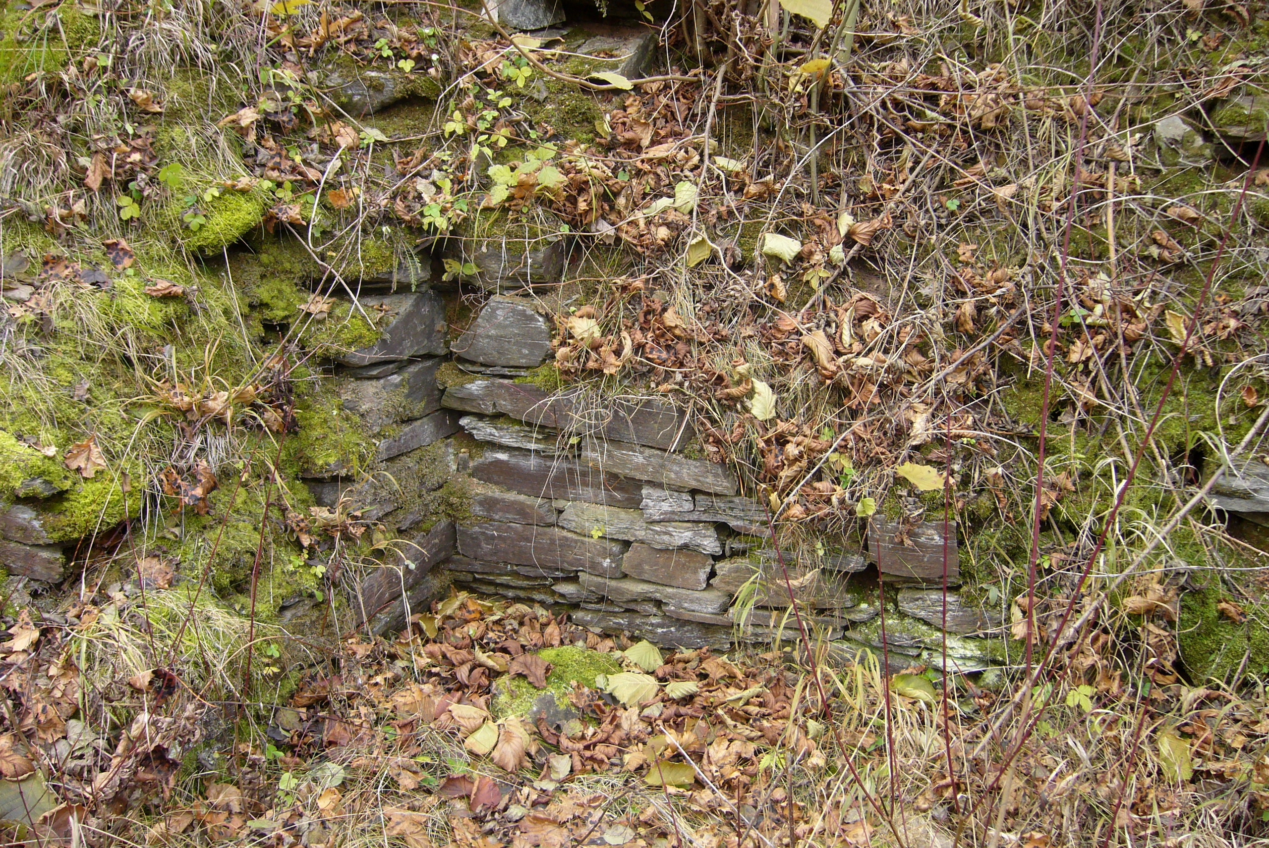 Nevděk - fragment paláce